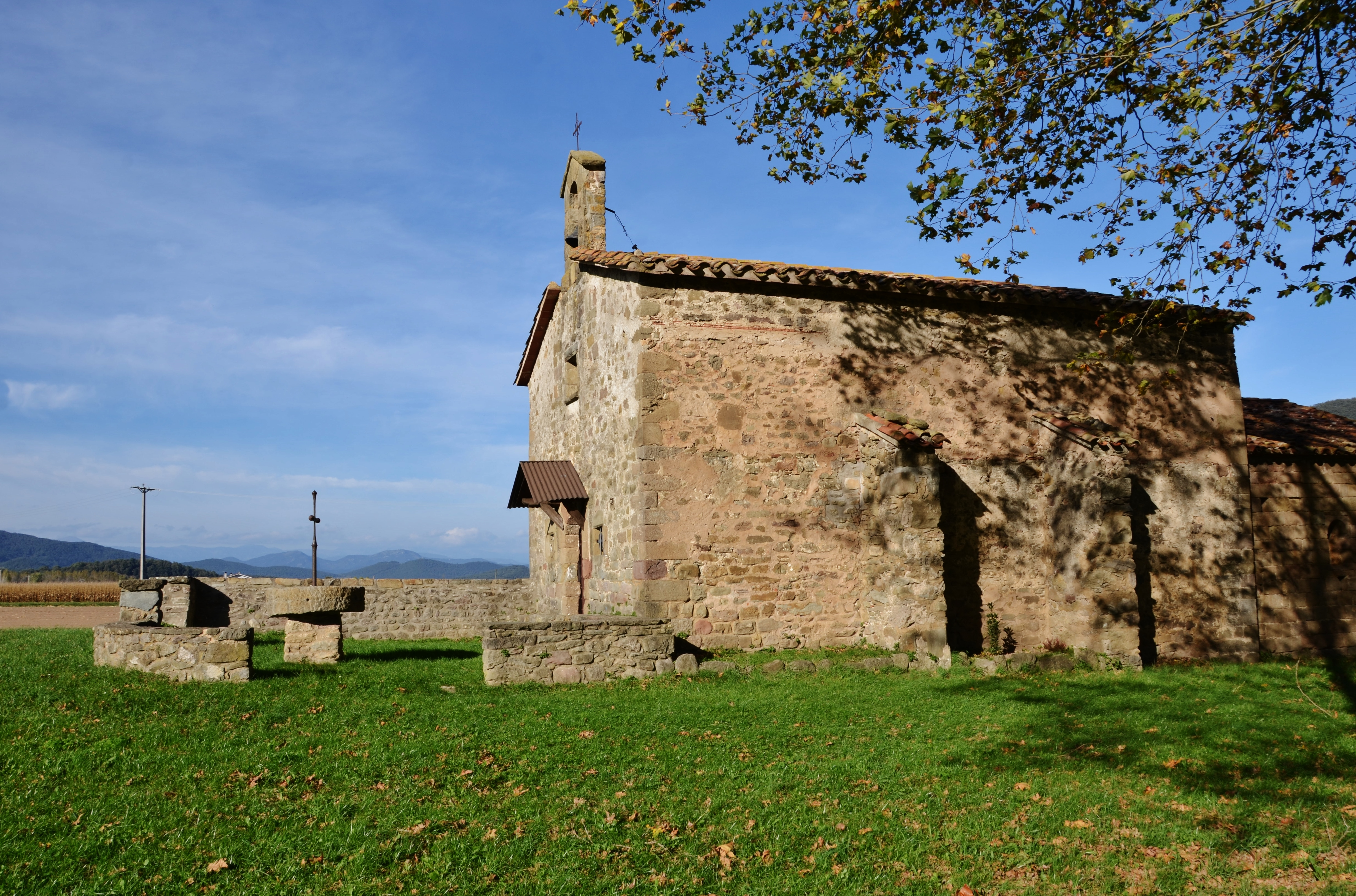 Ermita romànica de Sant Quintí, Sant Esteve d'En Bas, La Vall d'en Bas, Garrotxa